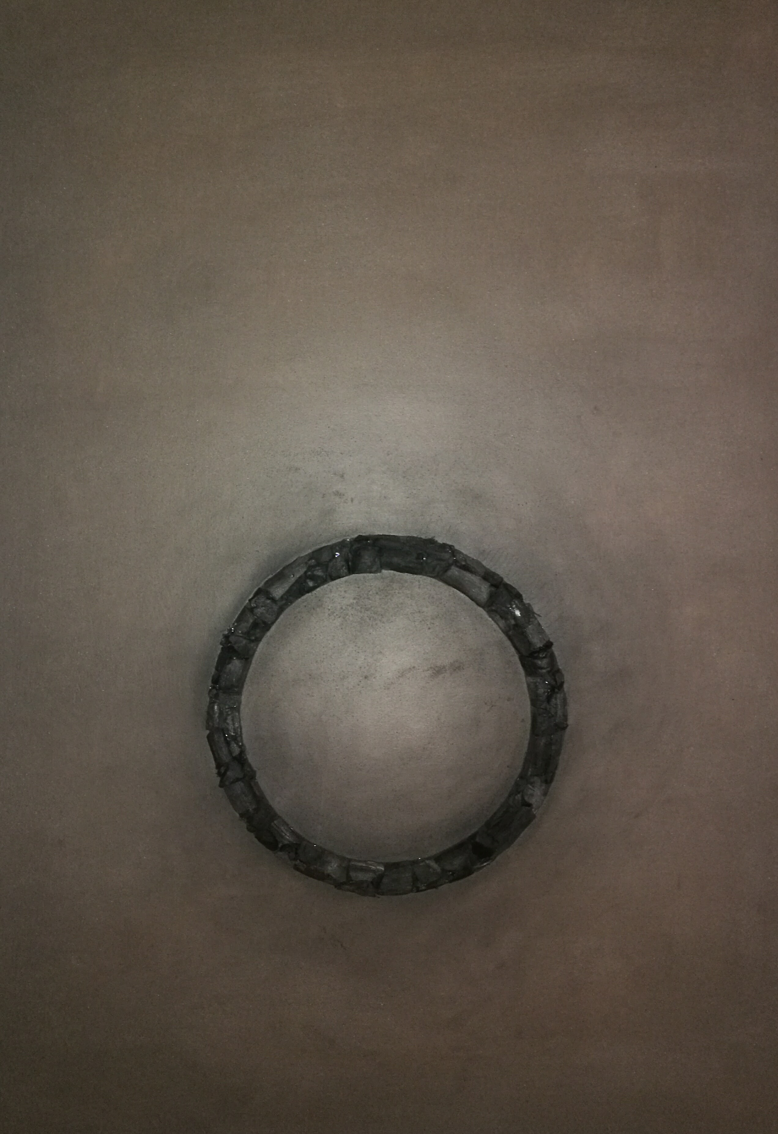 Oltre: opera di Vito Bongiorno (2017), creata con carbone e cenere